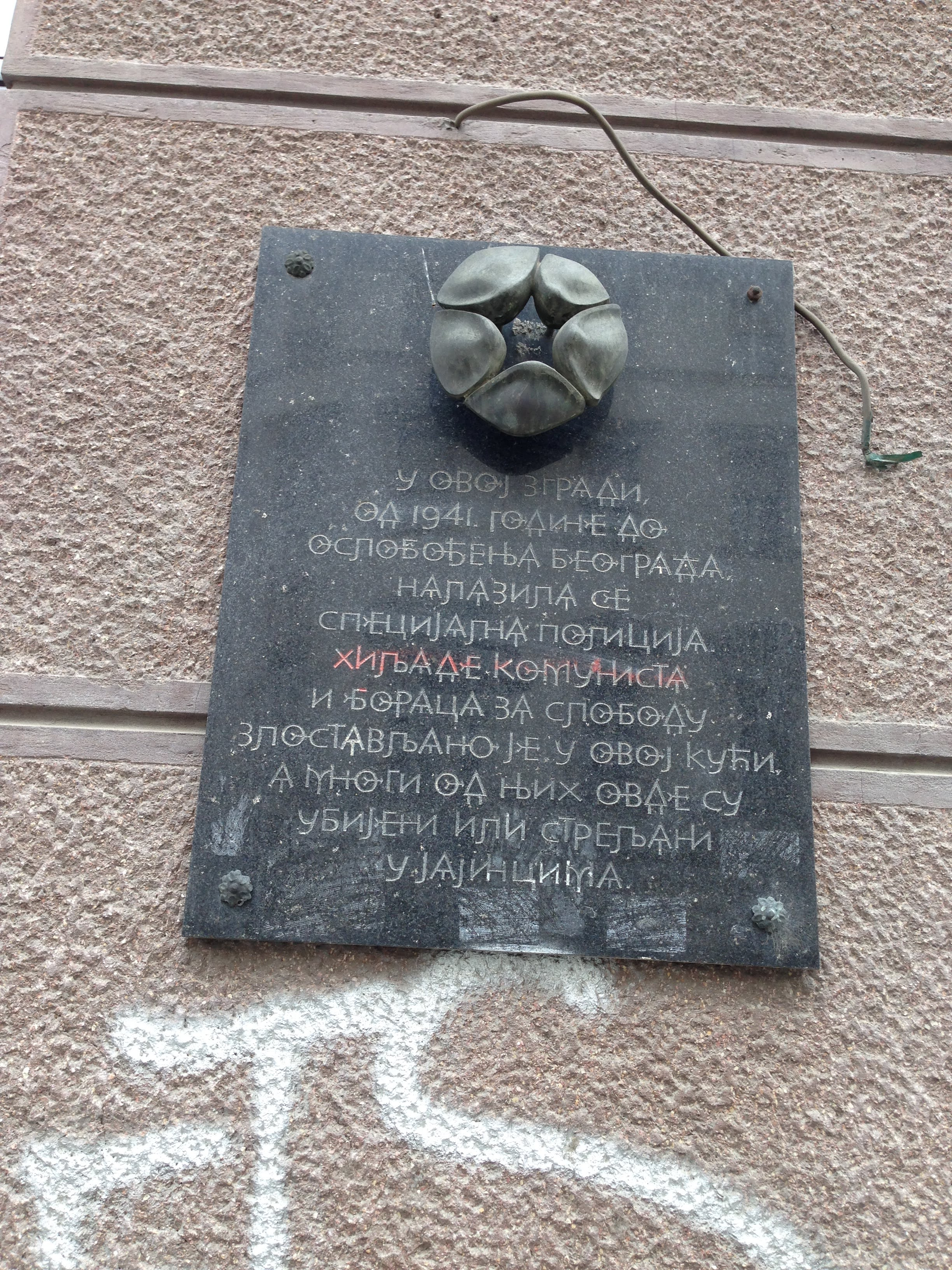 Sedište i zatvor Specijalne policije (1941-1944), Beograd, Obilićev venac 4